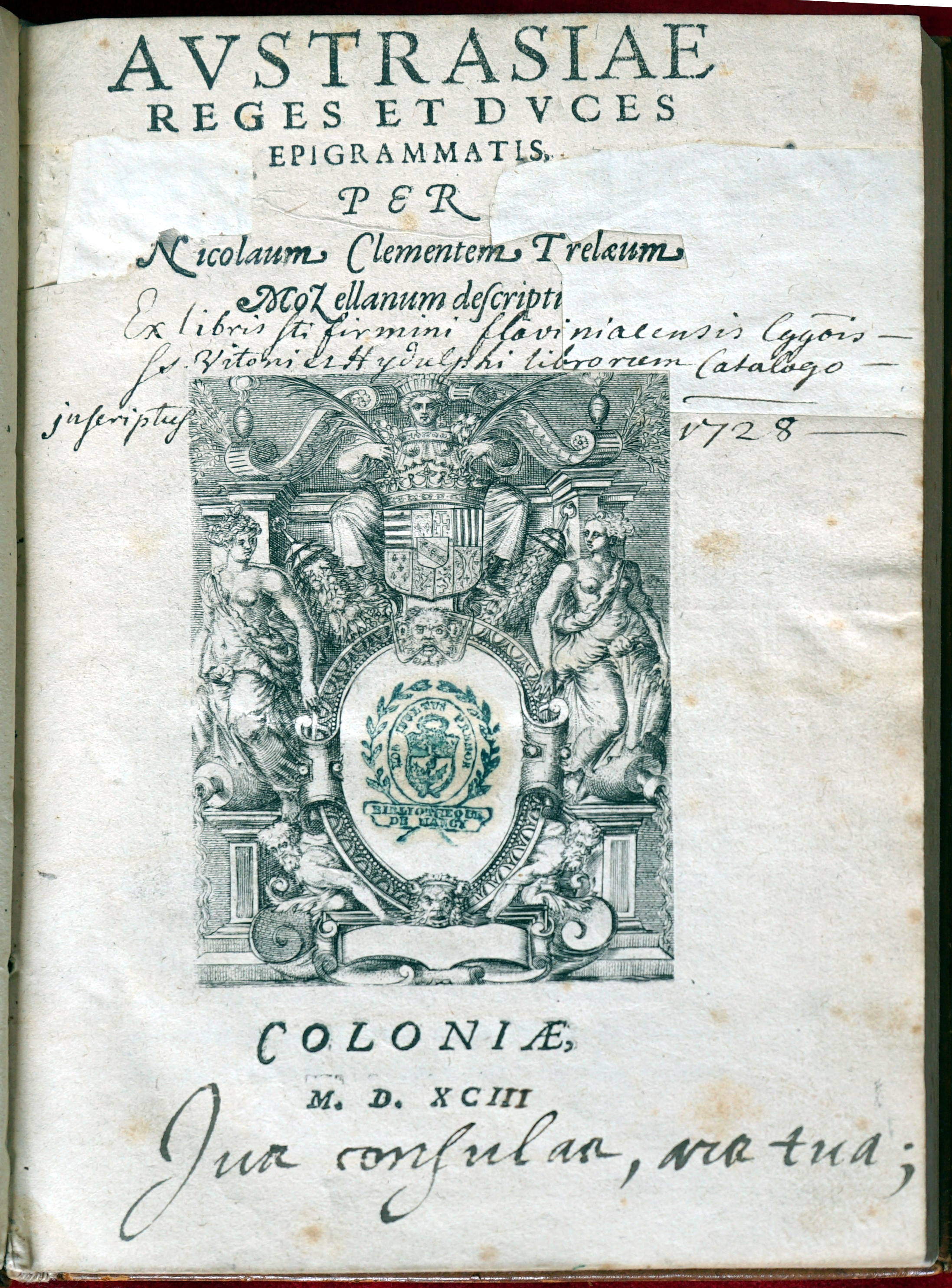 extrait du livre conservé à Nancy.